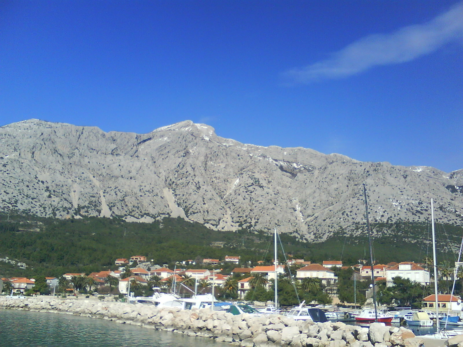 Marina u Orebić